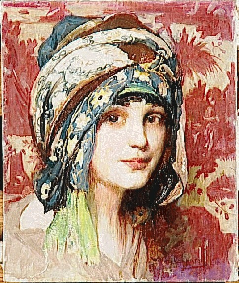 William Laparra, Tête de jeune fille au turban vert, huile sur toile